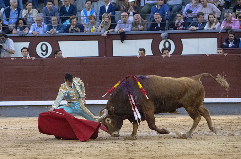 Fortes realiza un doblón por el lado natural, con la derecha, en Las Ventas